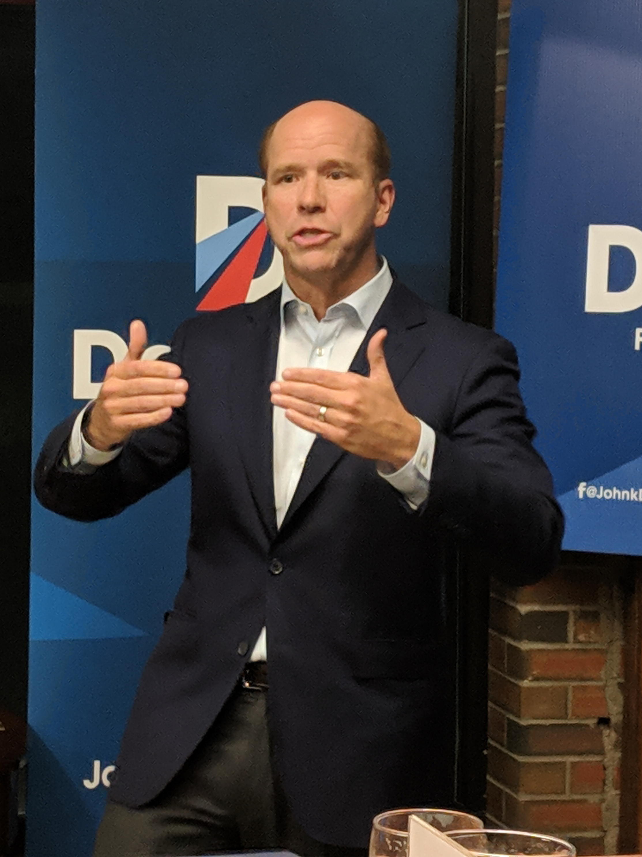 John Delaney